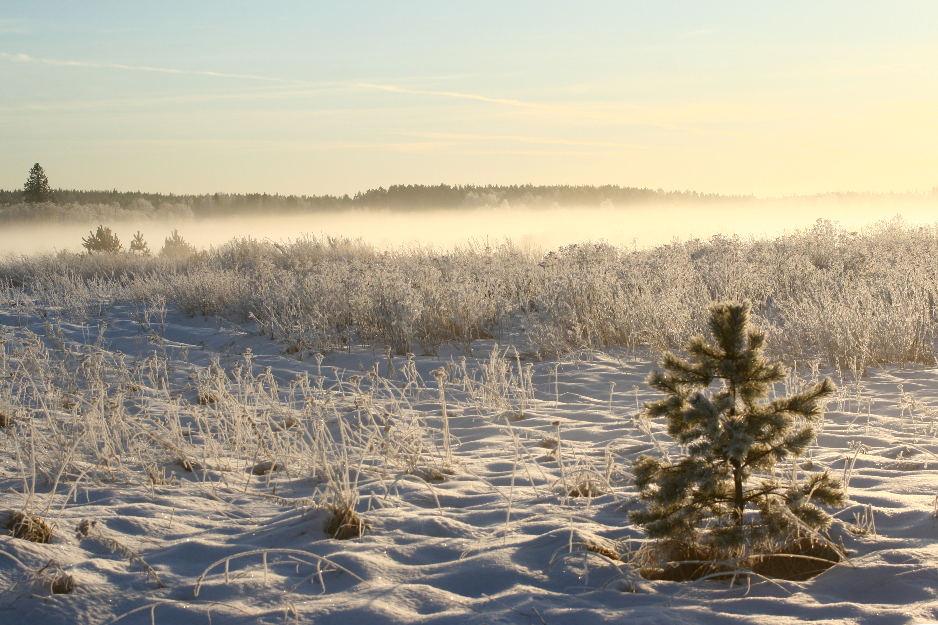 Harjumaal, Kõue vallas